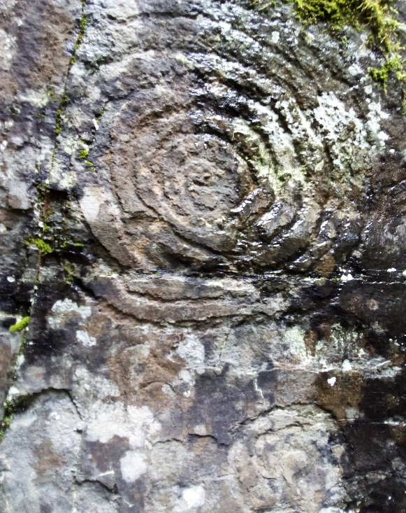 Petroglifo encontrado en el yacimiento arqueológico de la Zarza, espiral.